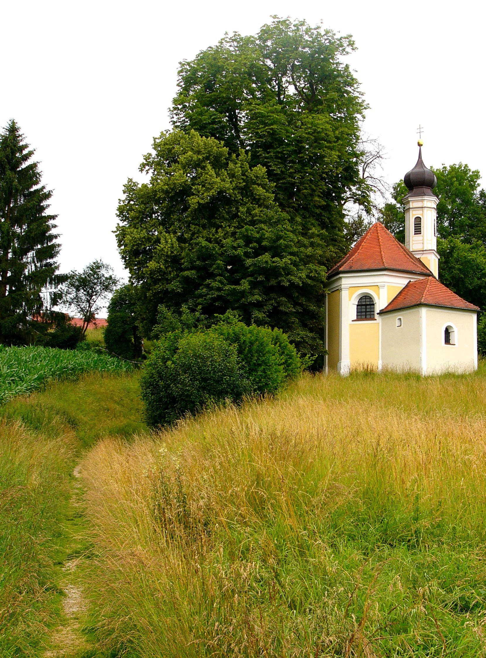 Wallfahrtskirchlein Maria BründlThis is a photograph of an architectural monument.